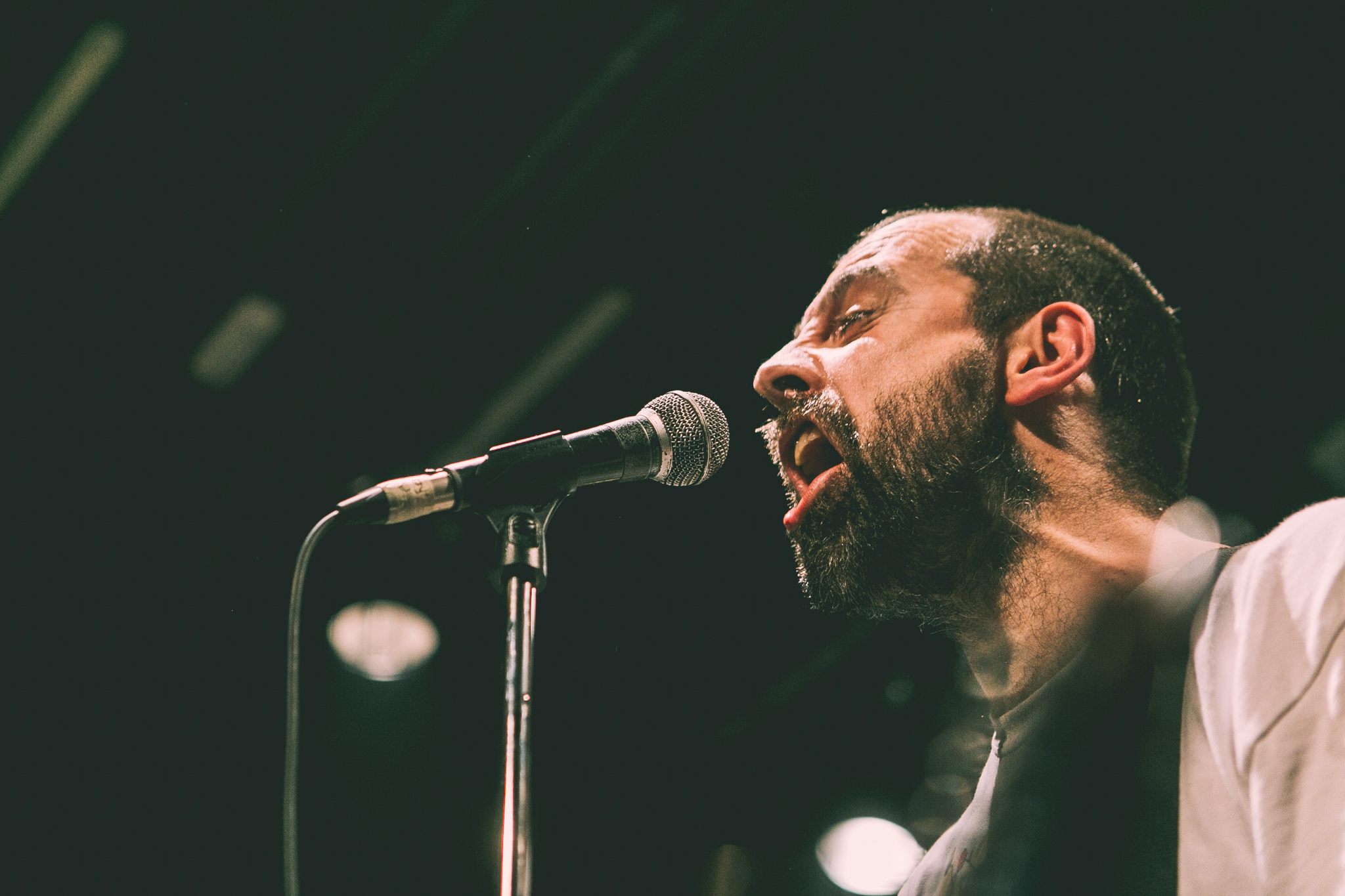 Inoren Ero Ni Dkluba kontzertua Intxaurrondo K.E.an. Argazkiak/fotos: Lorena Otero 2017/12/16